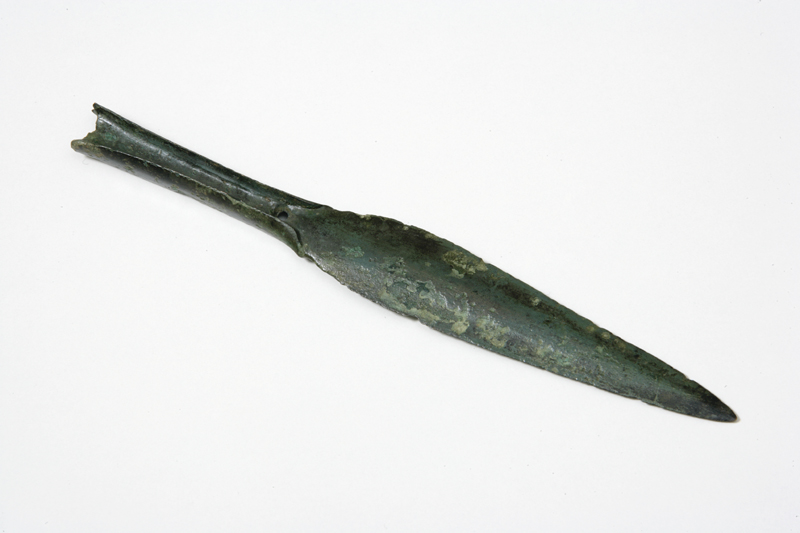 Pugnale a lingua di presa in bronzo, di tipo Bertarina.